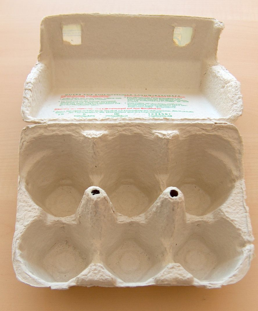 Eierkarton für sechs Eier